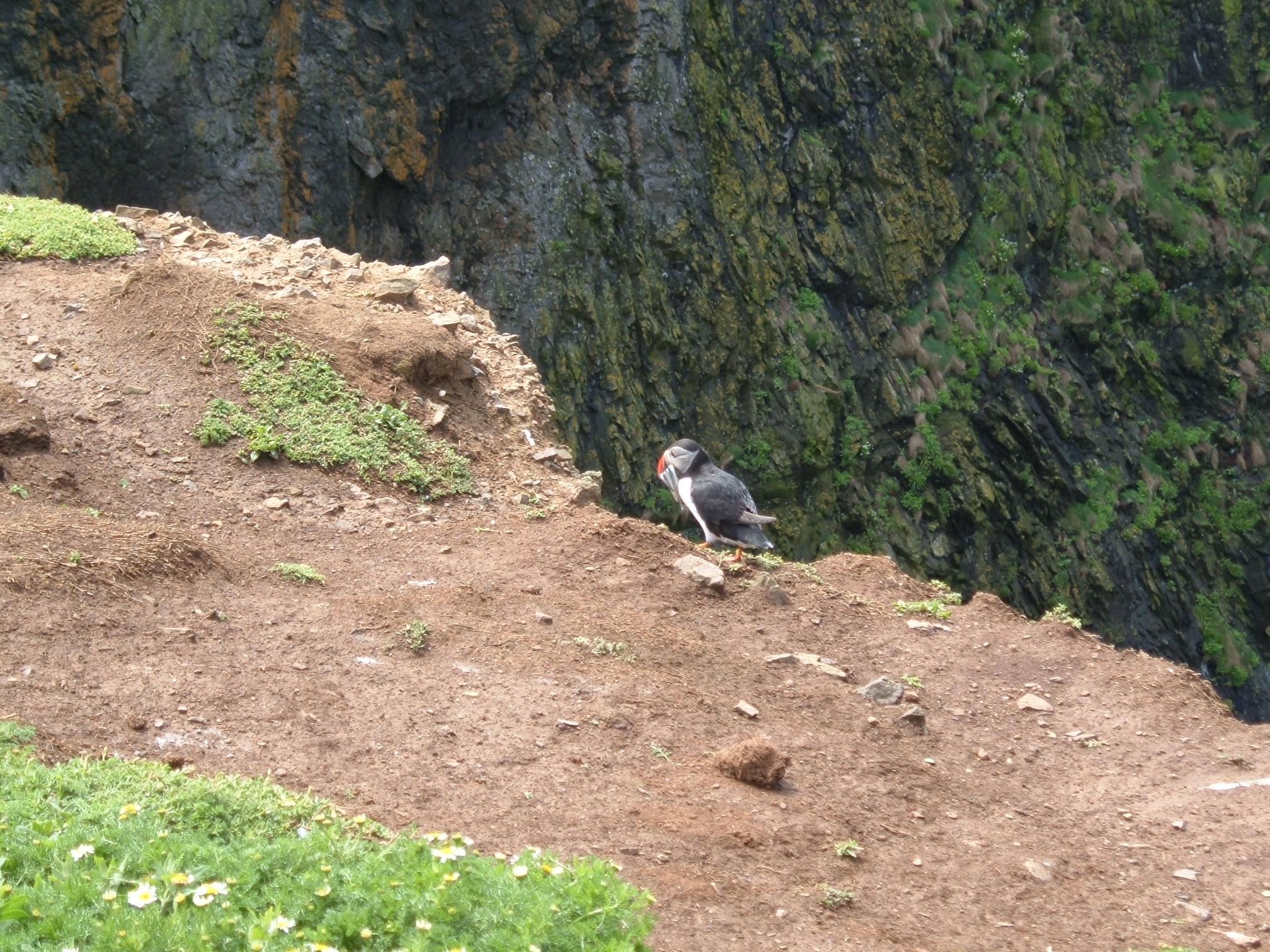 Fratercula arctica